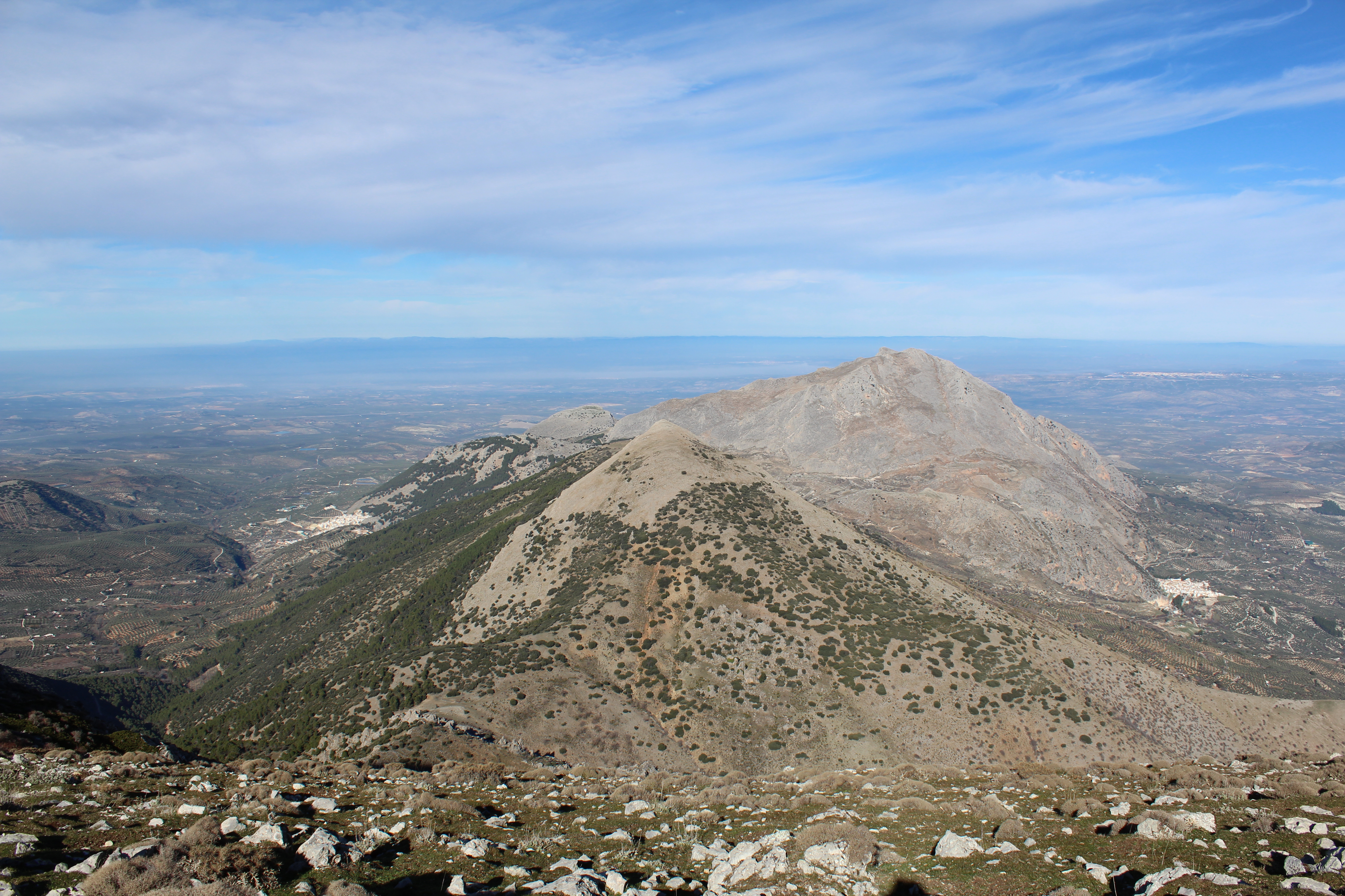 Vista de las localidades de Torres y Albanchez de Mágina, del Cerro Monteagudo en primer término y del cerro Aznaitín detrás de éste.